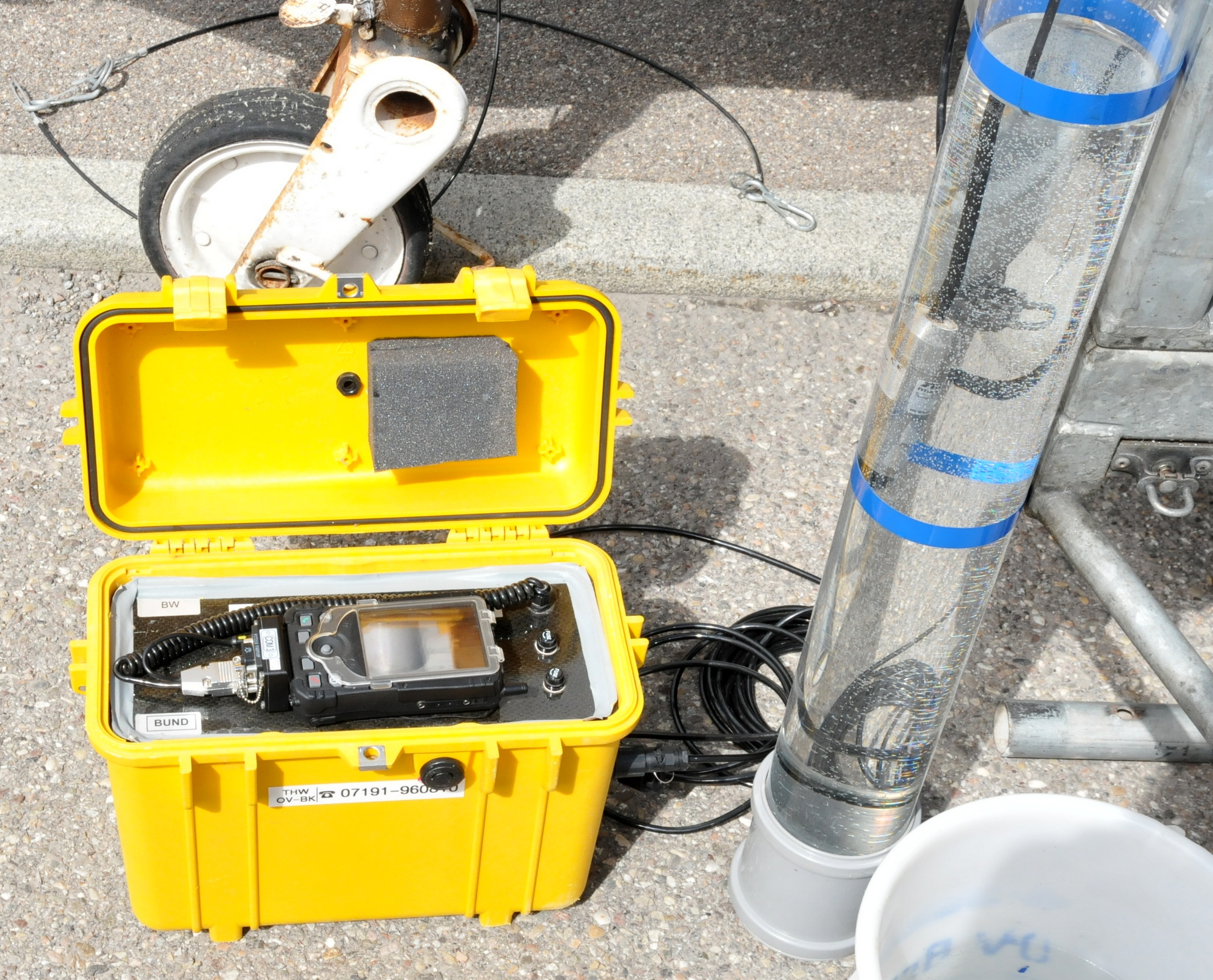 Mobiles Pegelmessgerät des THW